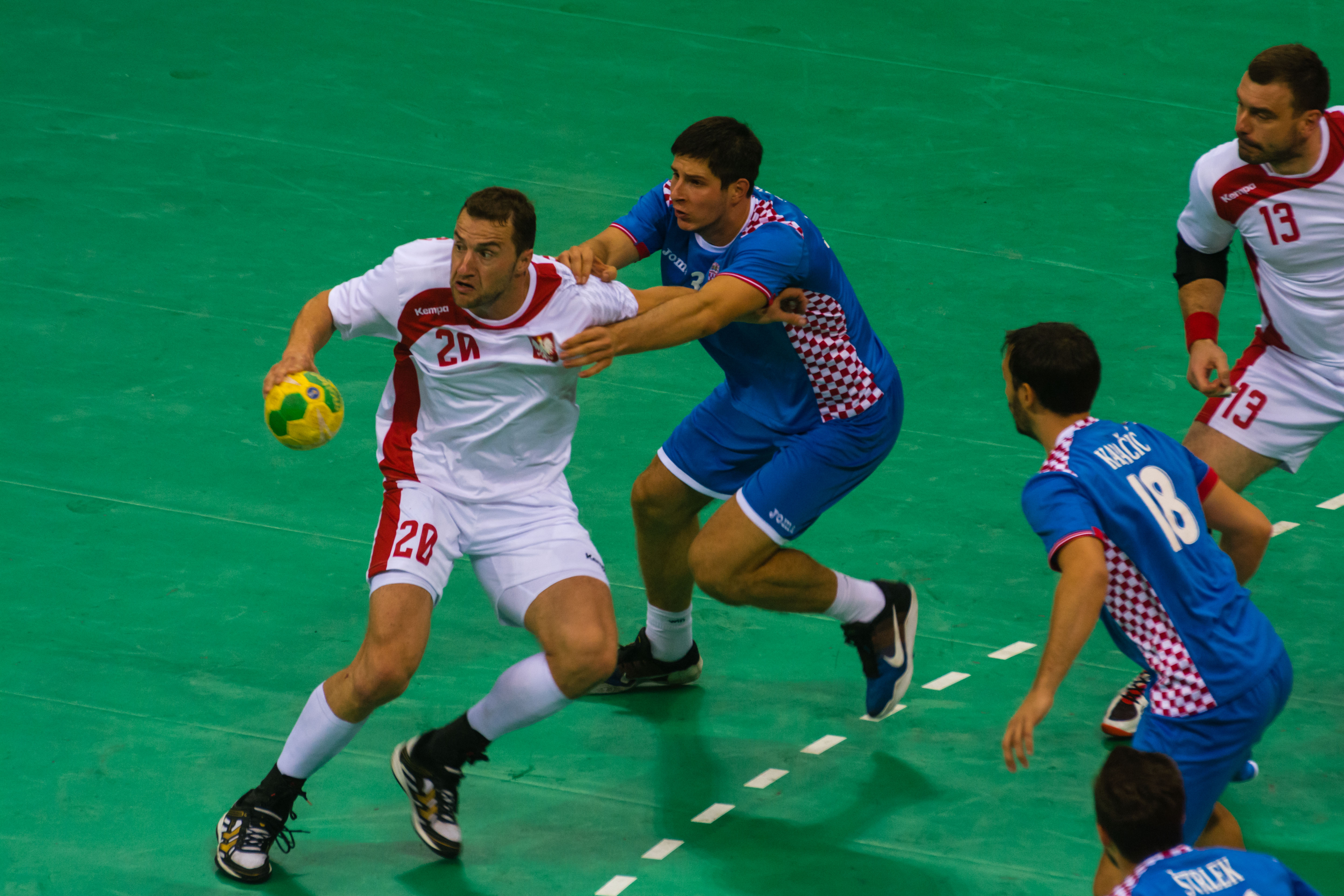 Disputa entre Polônia e Croácia nas quartas de final. Partida realizada em 17/08/2016 na Arena do Futuro (parque Olímpico).